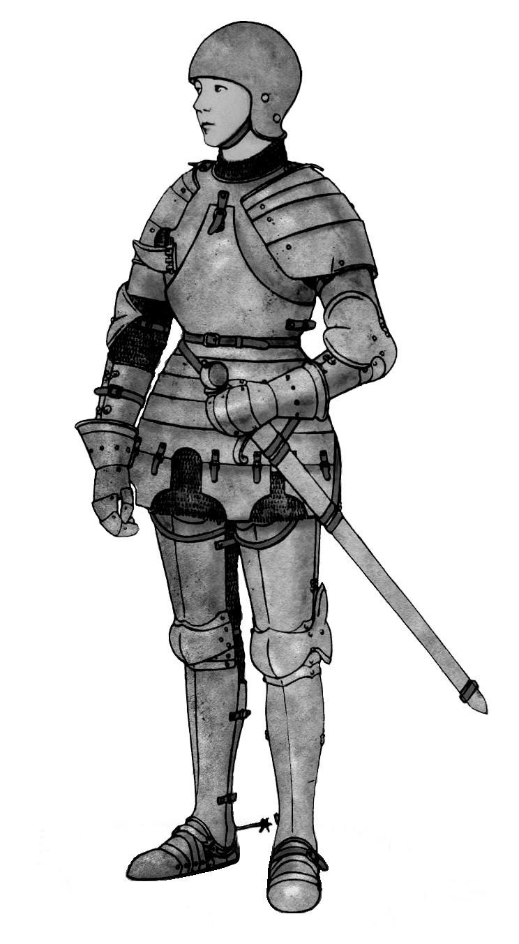 Armure de Jeanne d'Arc, essai de reconstitution d'Adrien Harmand dans Jeanne d'Arc : ses costumes, son armure : essai de reconstitution, Paris, imprimerie Aulard, librairie Ernest Leroux, 1929, p. 214. Reproduit dans Christophe Gilliot et Josselin Gosselin, Orléans 1429 : le siège au jour le jour, Bayeux, Heimdal, 2008, ISBN 978-2-84048-253-6, p. 38.